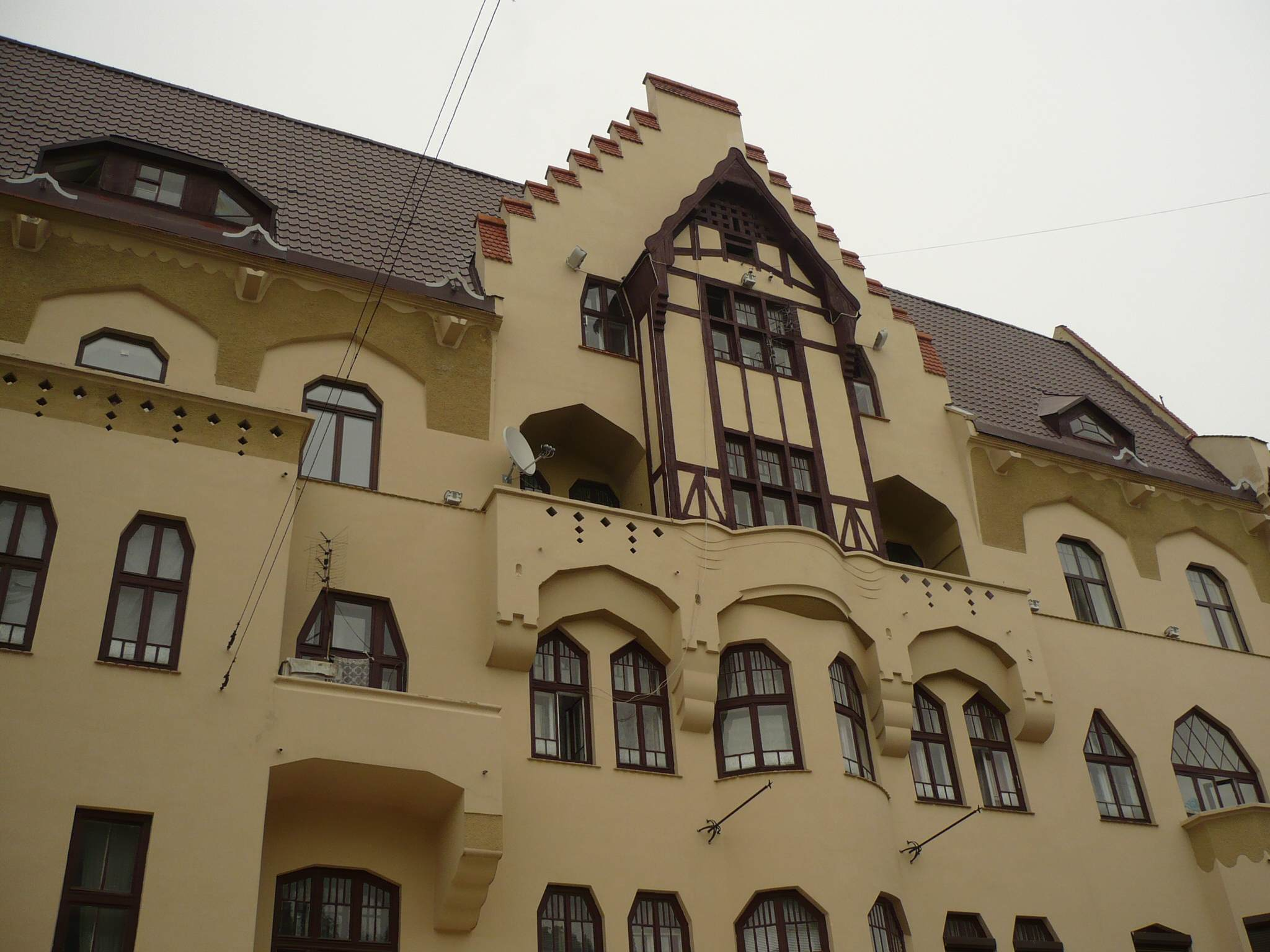 Czerniowce, Dom Niemiecki, 12.7.2009